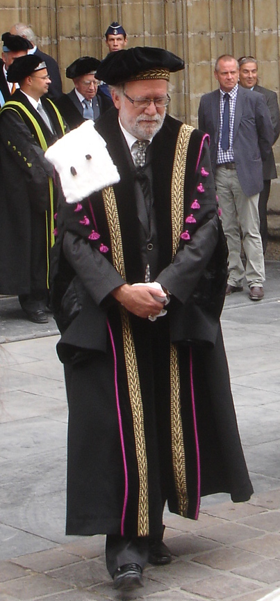 Prof Dr. Van Cauwenberghe, rector Universiteit Gent bij het Te Deum van 2010